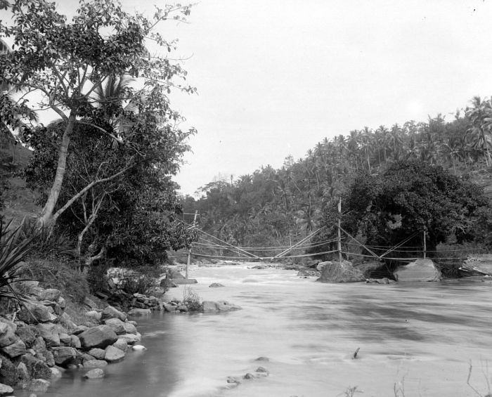 Negatif. Jembatan bambu melintasi Sungai Ombilin ketika ekspolrasi oleh Ijzerman dan Delprat (kemungkinan untuk persiapan pembuatan jalur rel)